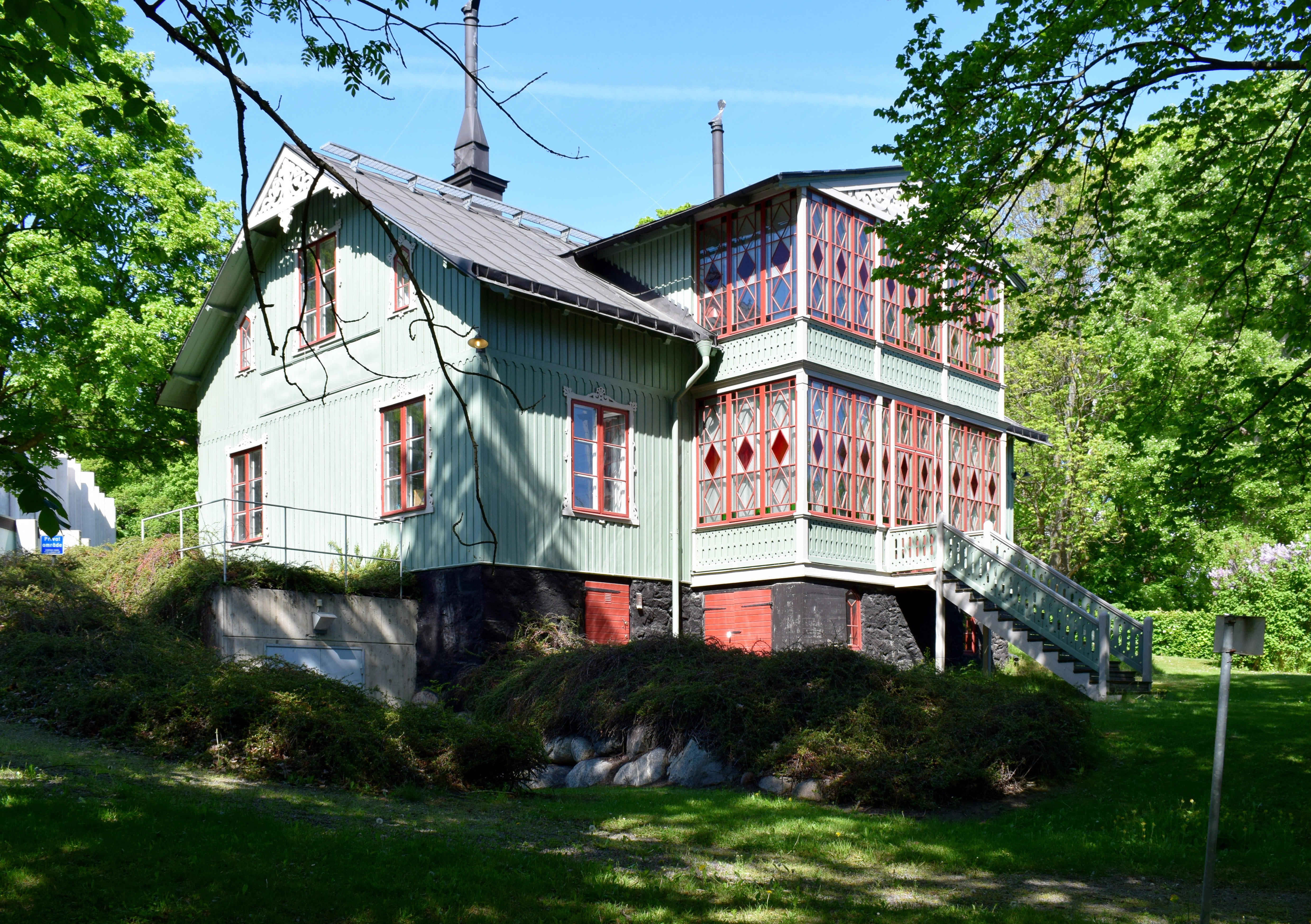 "Törnerska villan" i Diplomatstaden i Stockholm.